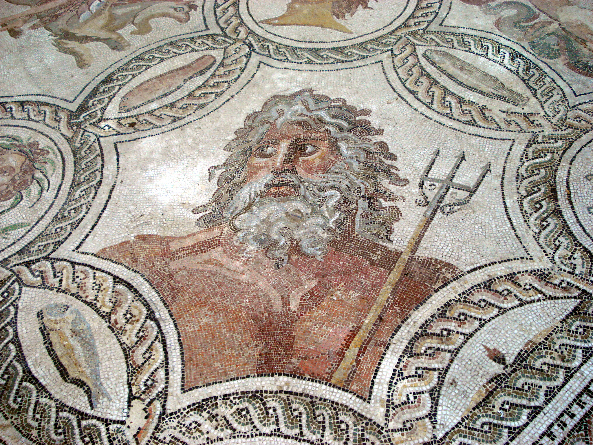 Nettuno. Dettaglio dal "Mosaico delle Stagioni", di epoca romana, da Palermo. Museo archeologico regionale di Palermo, 28 settembre 2006. Foto di Giovanni Dall'Orto.